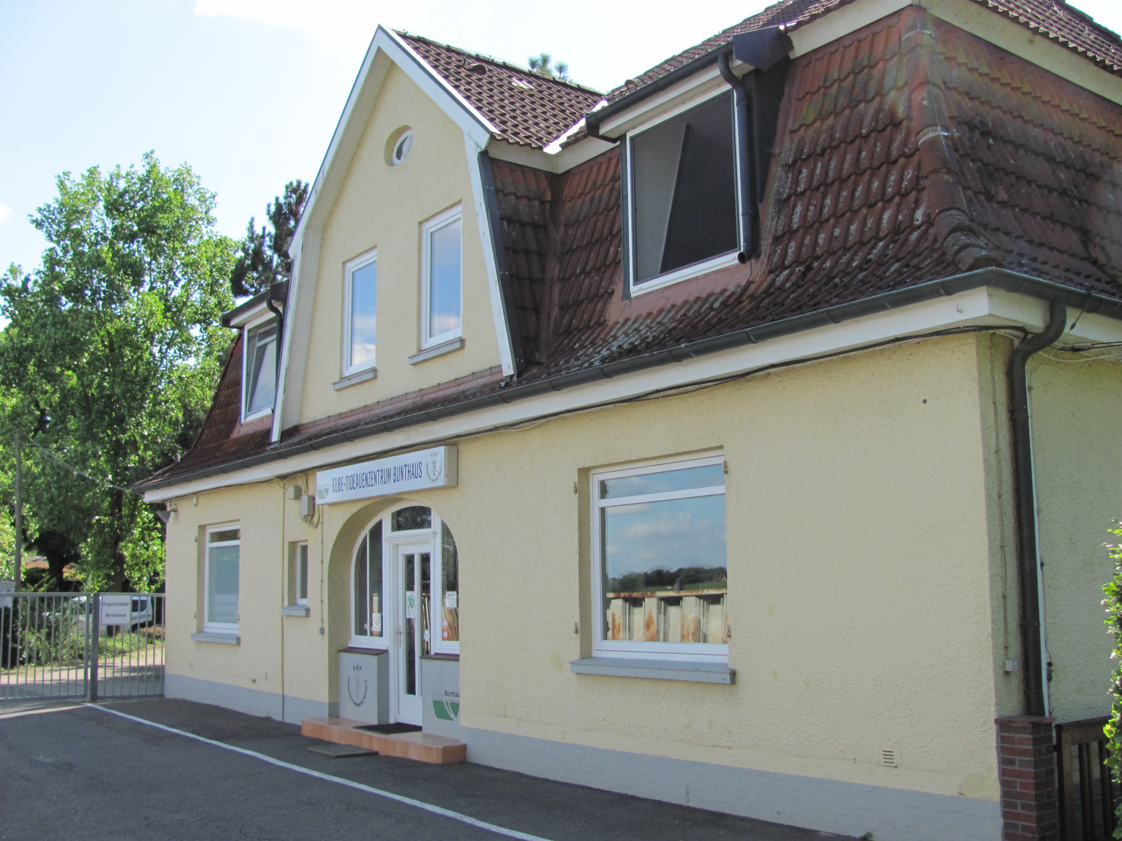 Elbe-Tideauenzentrum Bunthaus, Hamburg-Wilhelmsburg